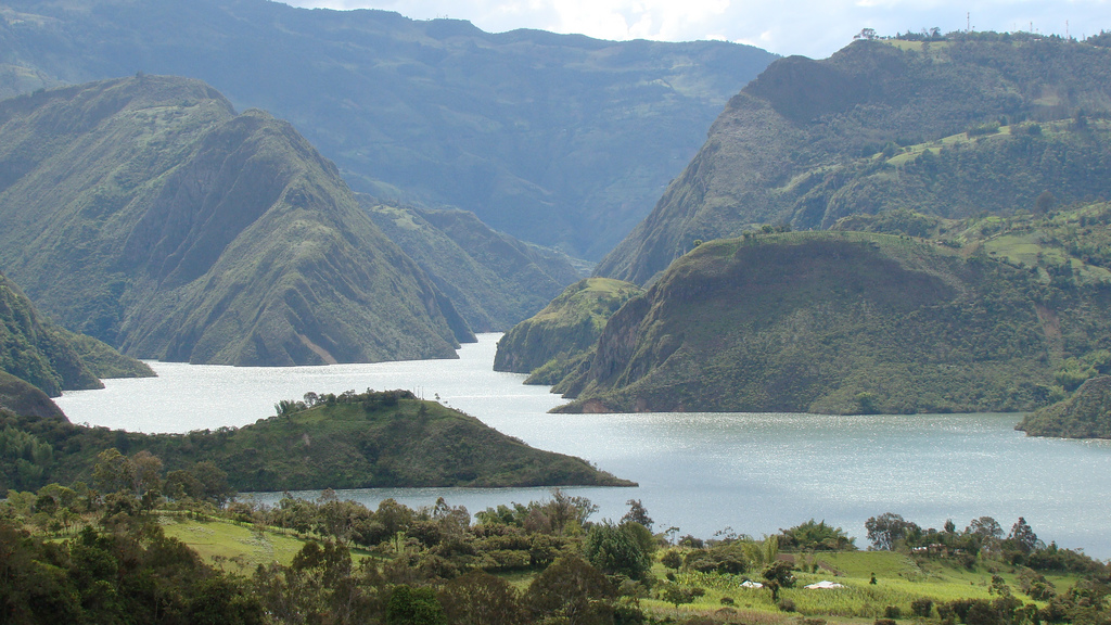 Guavio